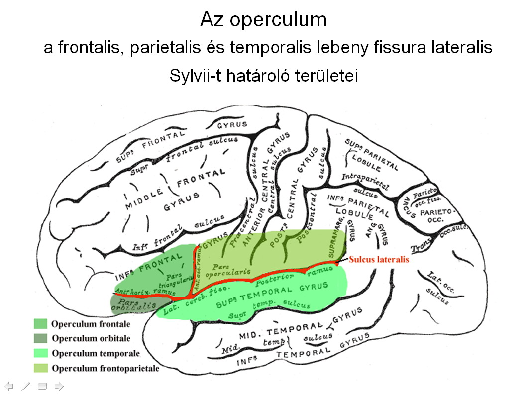 Operculum